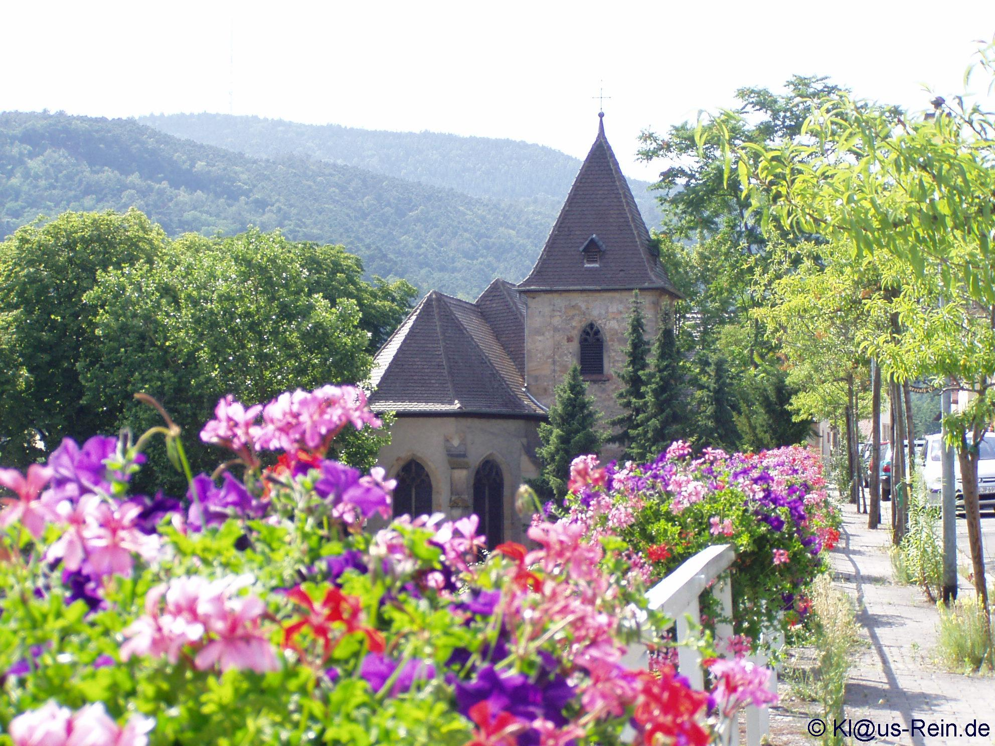 Bildbeschreibung: Nikolauskirche (Gimmeldingen) aus Nordosten Fotograf/Zeichner: Klaus Rein, 67435 Neustadt an der Weinstraße-Mußbach, Johann-Gottlieb-Fichte-Str. 29 Datum: 2005 Sonstiges: GNU-Freigabe für Wikipedia gem. persönlicher Mail von Klaus Rein an Benutzer:Mundartpoet vom 16. März 2006